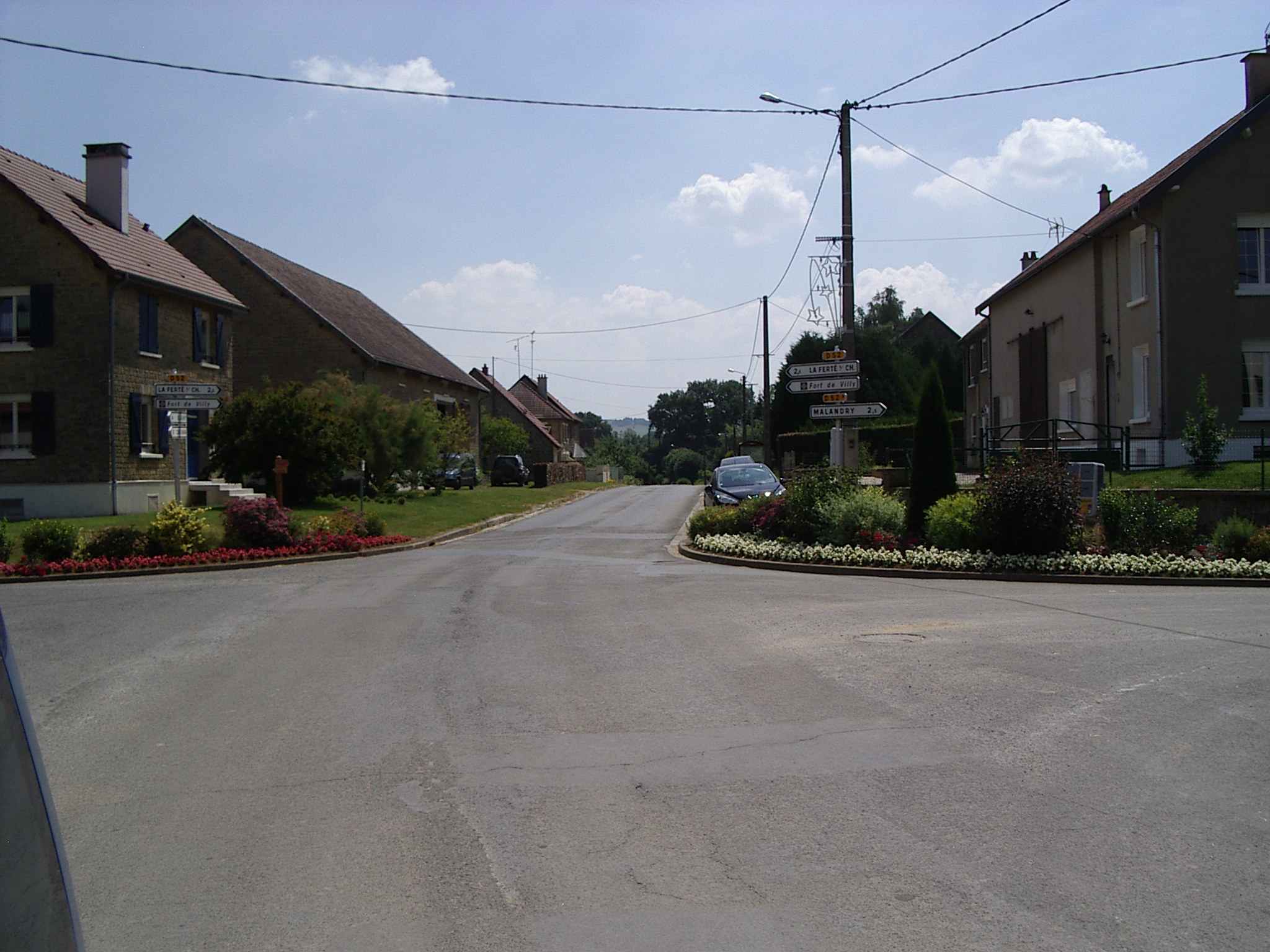 Villy est une commune française, située dans le département des Ardennes et la région Champagne-Ardenne